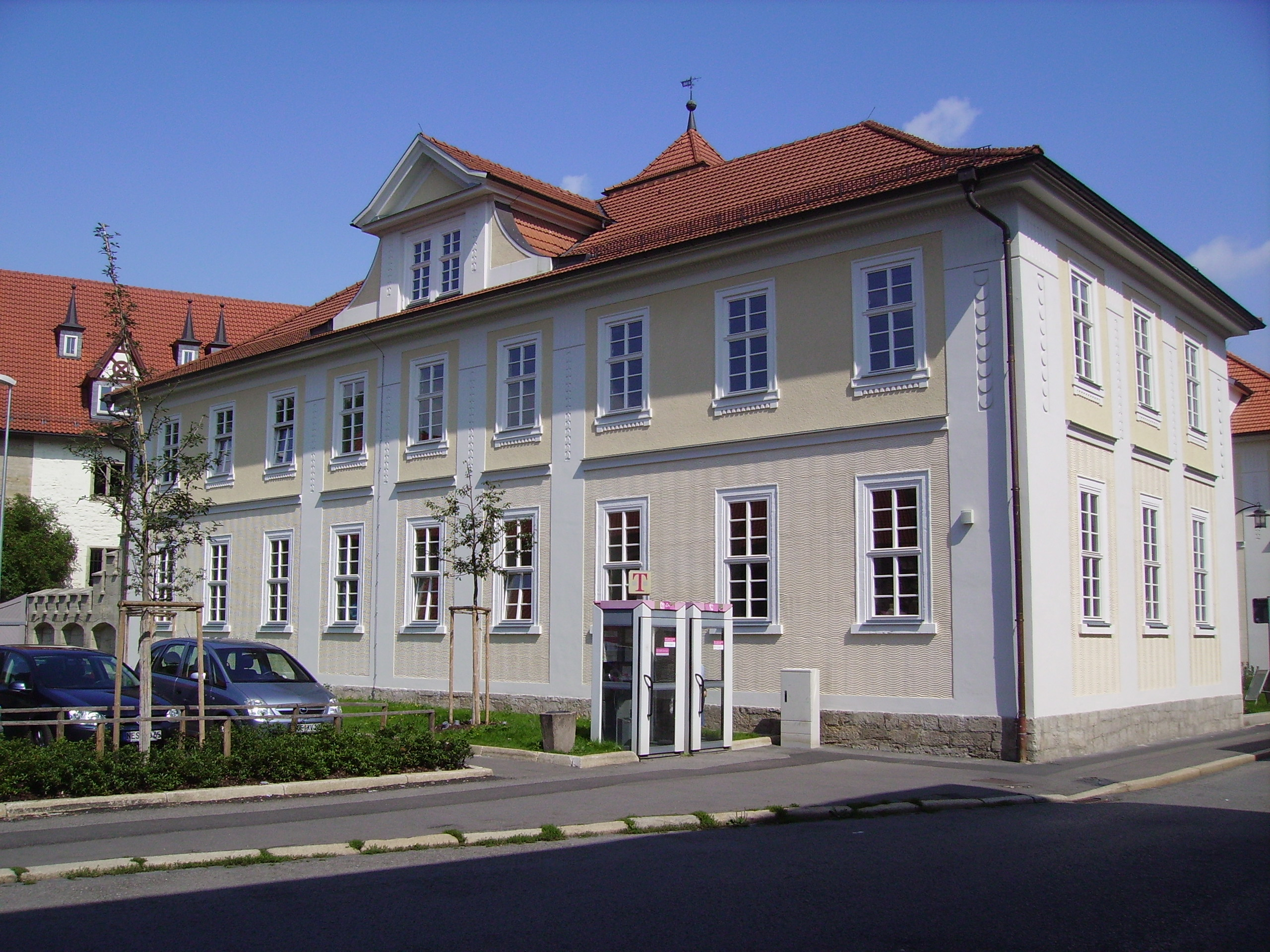 Gymnasium Bernhardinum, Meiningen (Thüringen, Germany), 1945—1963 Henfling-Gymnasium, danach Polytechnische Oberschule „Rudolf Baumbach“, heute Volkshochschule.